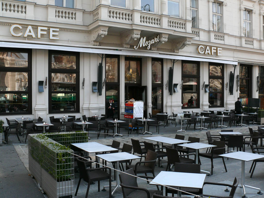 Café Mozart, Vienna